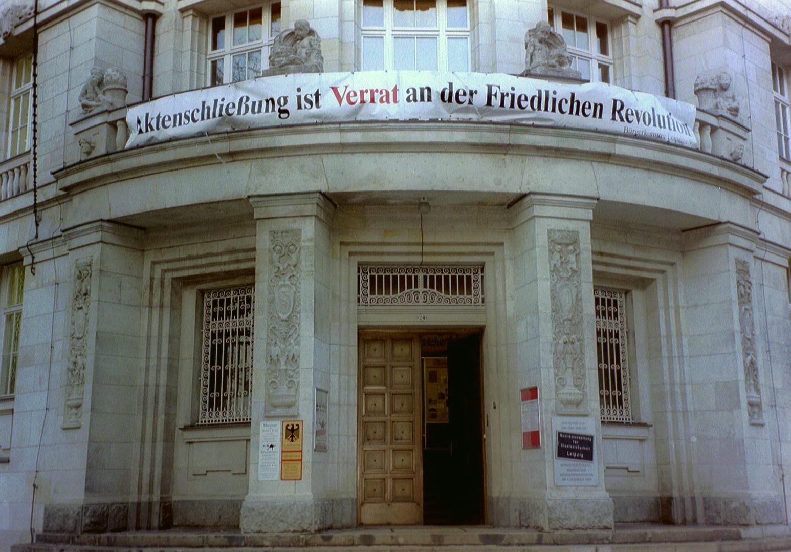 Gedenkstätte Museum "in der runden Ecke" Leipzig (ehemalige MfS Bezirksstelle) mit Transparent gegen eine geplante Museumsschließung